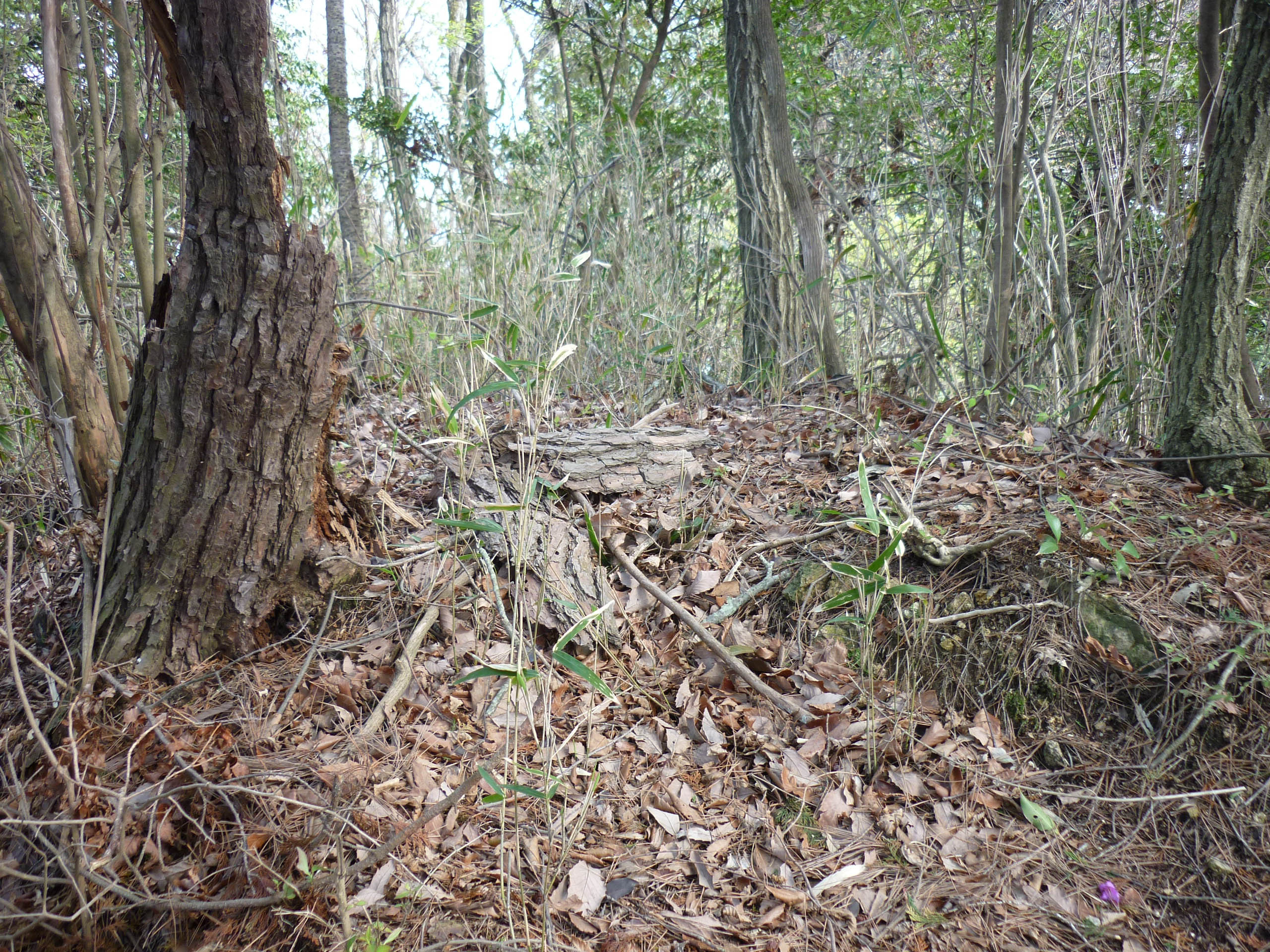 櫓台